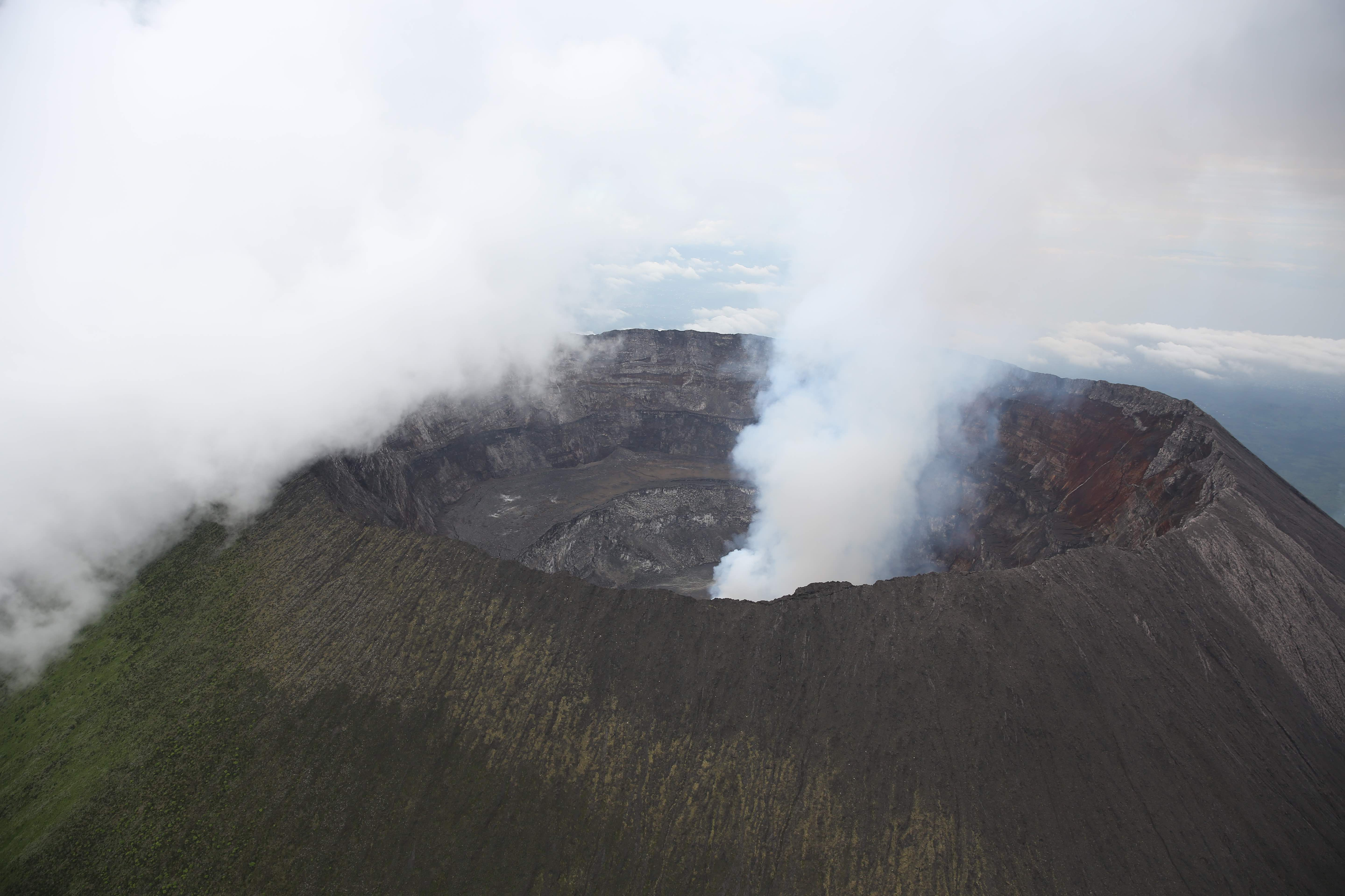 photo MONUSCO / Abel Kavanagh